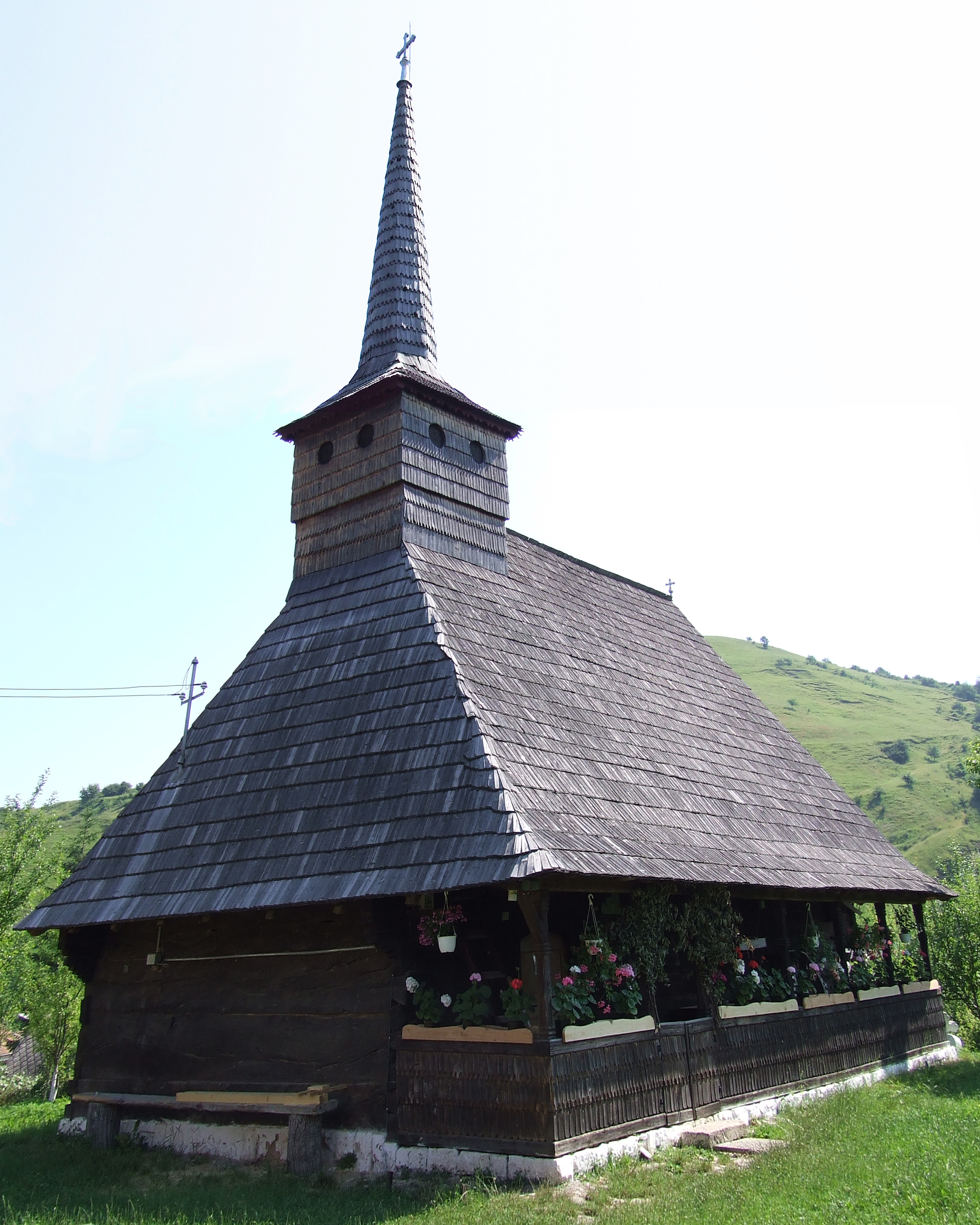 Biserica de lemn din Tăuţi